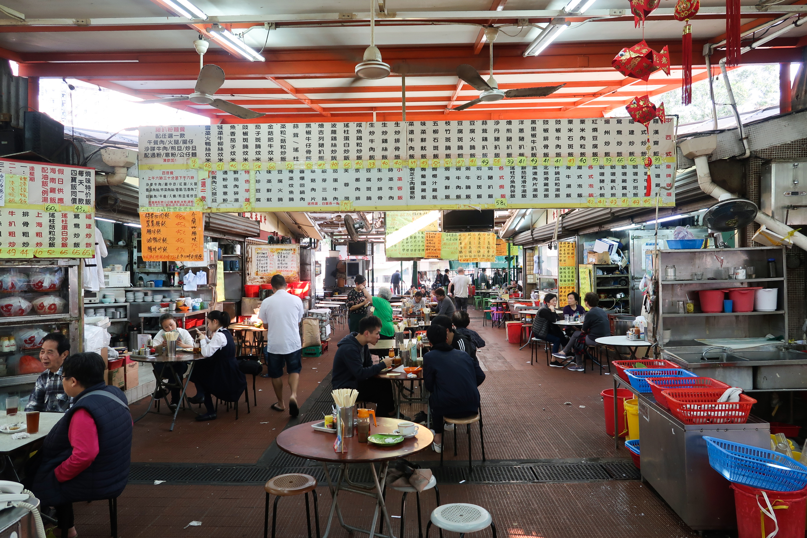 Sha Kok Estate Dai Pai Dong Interior